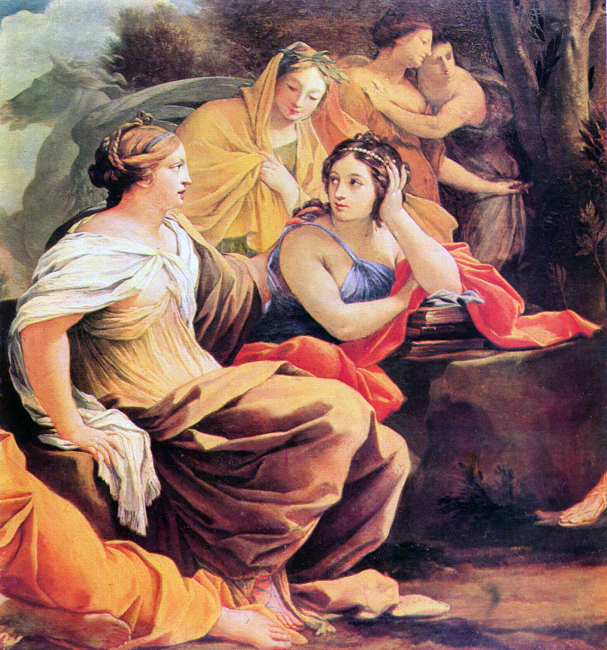 detail